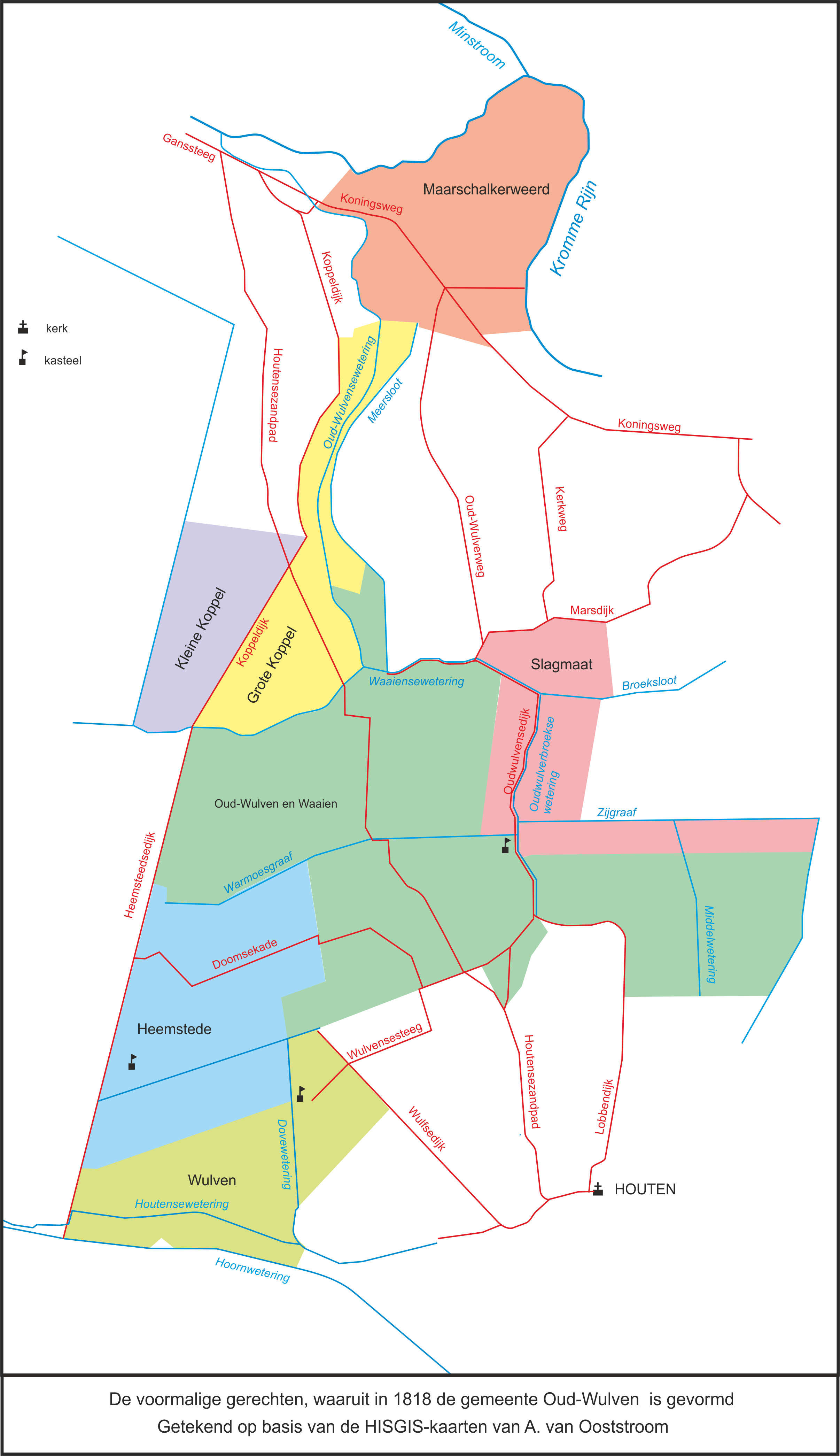 Kaart van de voormalige gerechten, die in 1818 de gemeente Oud-Wulven vormden